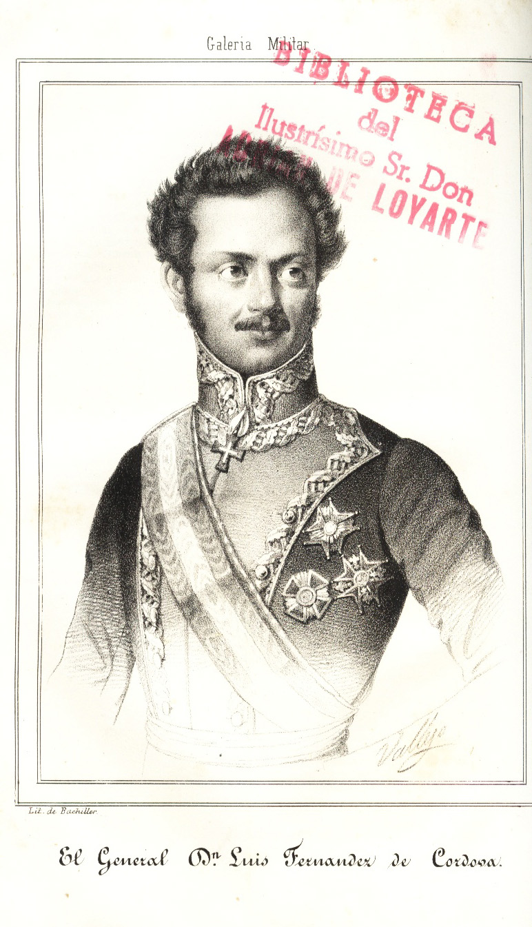 Grabado que representa al general español Luis Fernández de Córdova (1798-1840). "Galería Militar Contemporánea". Madrid 1846